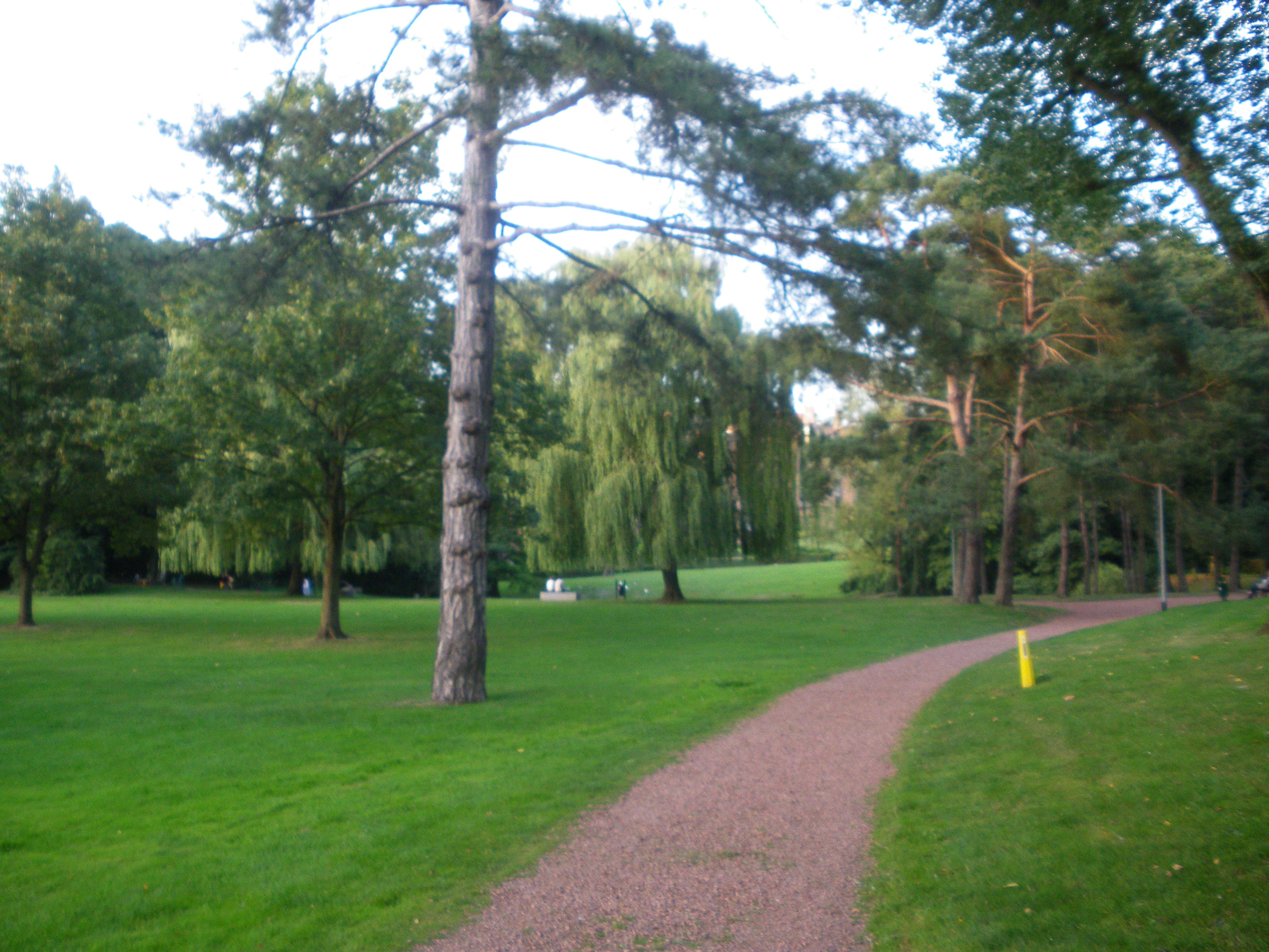 Vue du parc du Hautmont de Mouvaux dans le département du Nord.